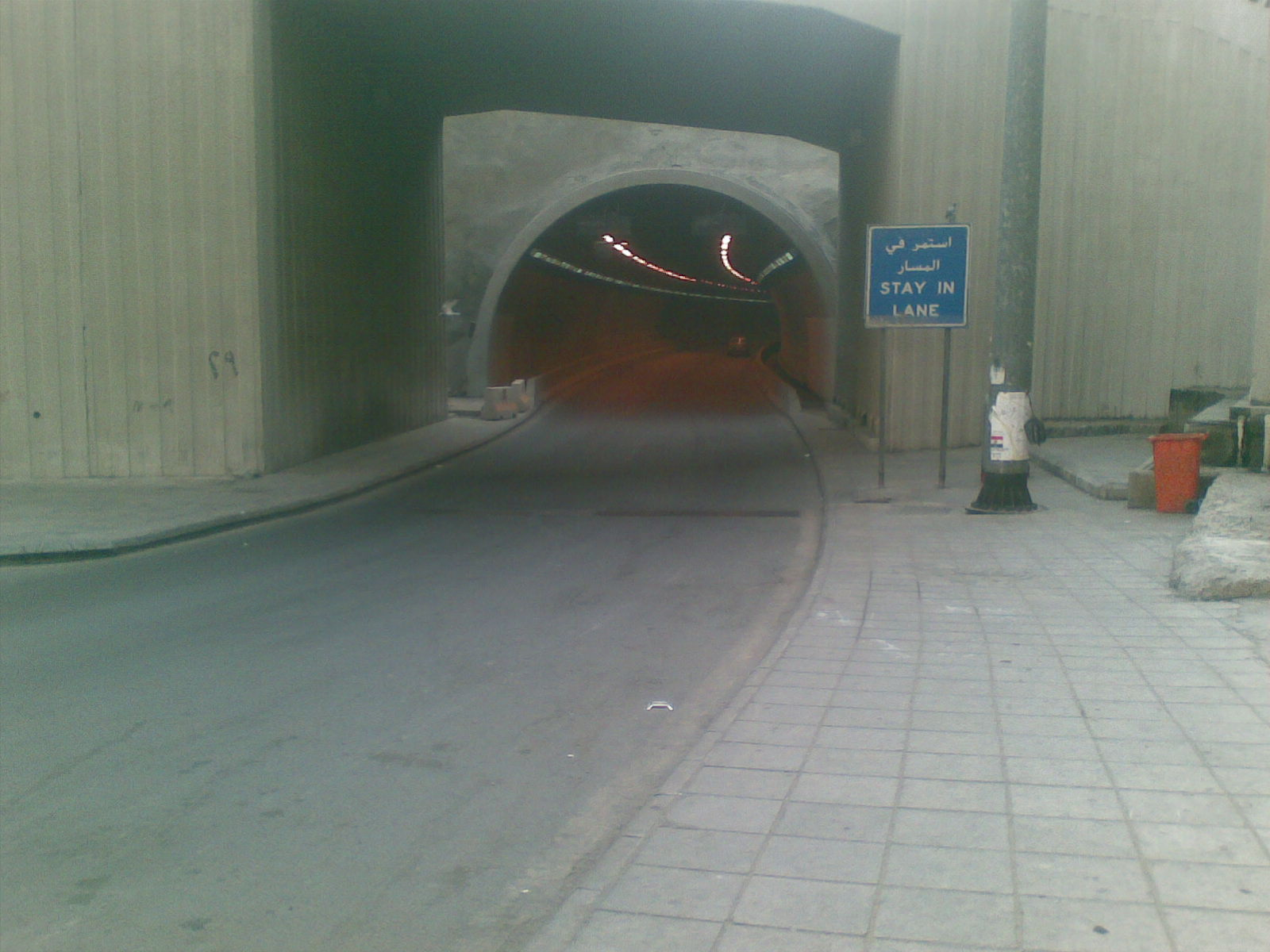 മക്കയില്‍ വാഹനങ്ങള്‍ കടന്നു പോകുന്ന തുരങ്കം